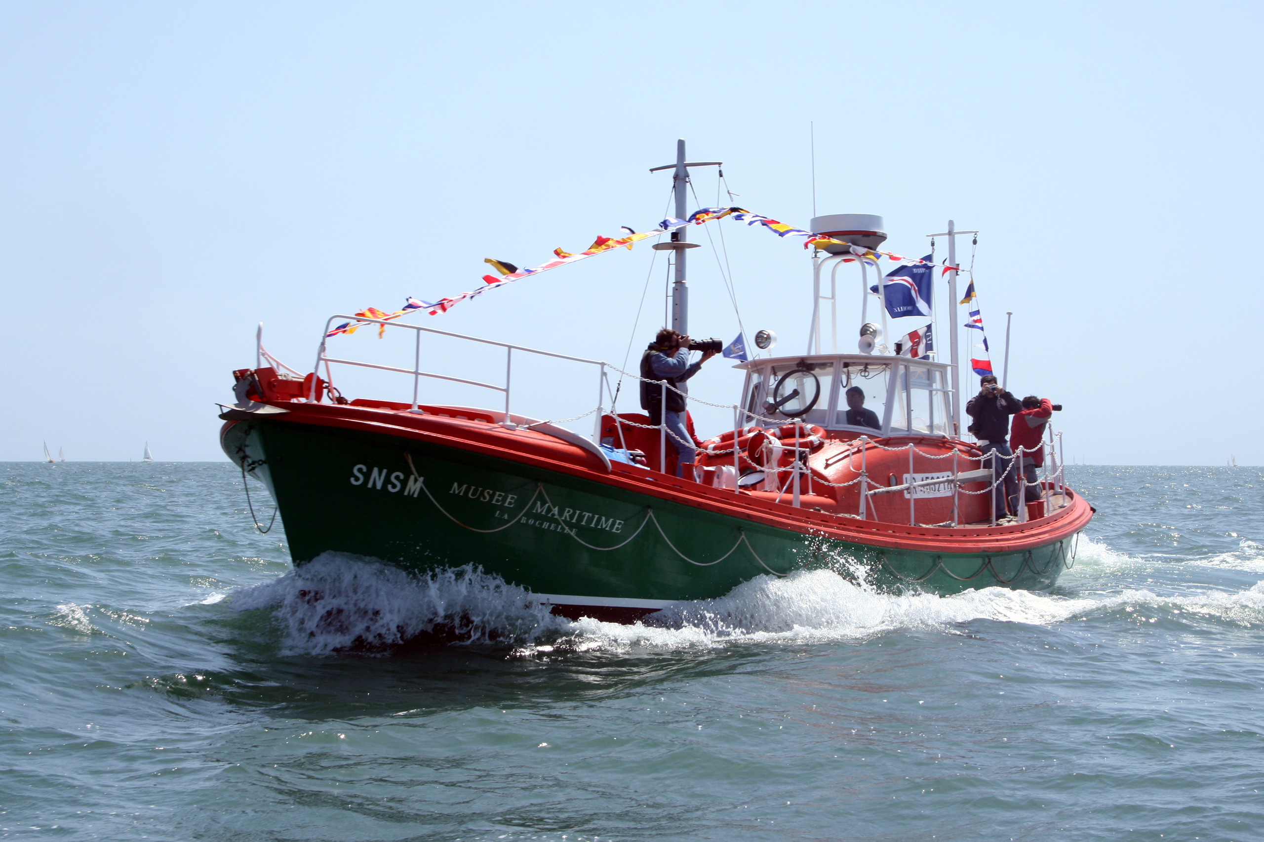 Cpt de frégate Leverger - Canot tous temps de la SNSM, restauré par le Musée Maritime de La Rochelle